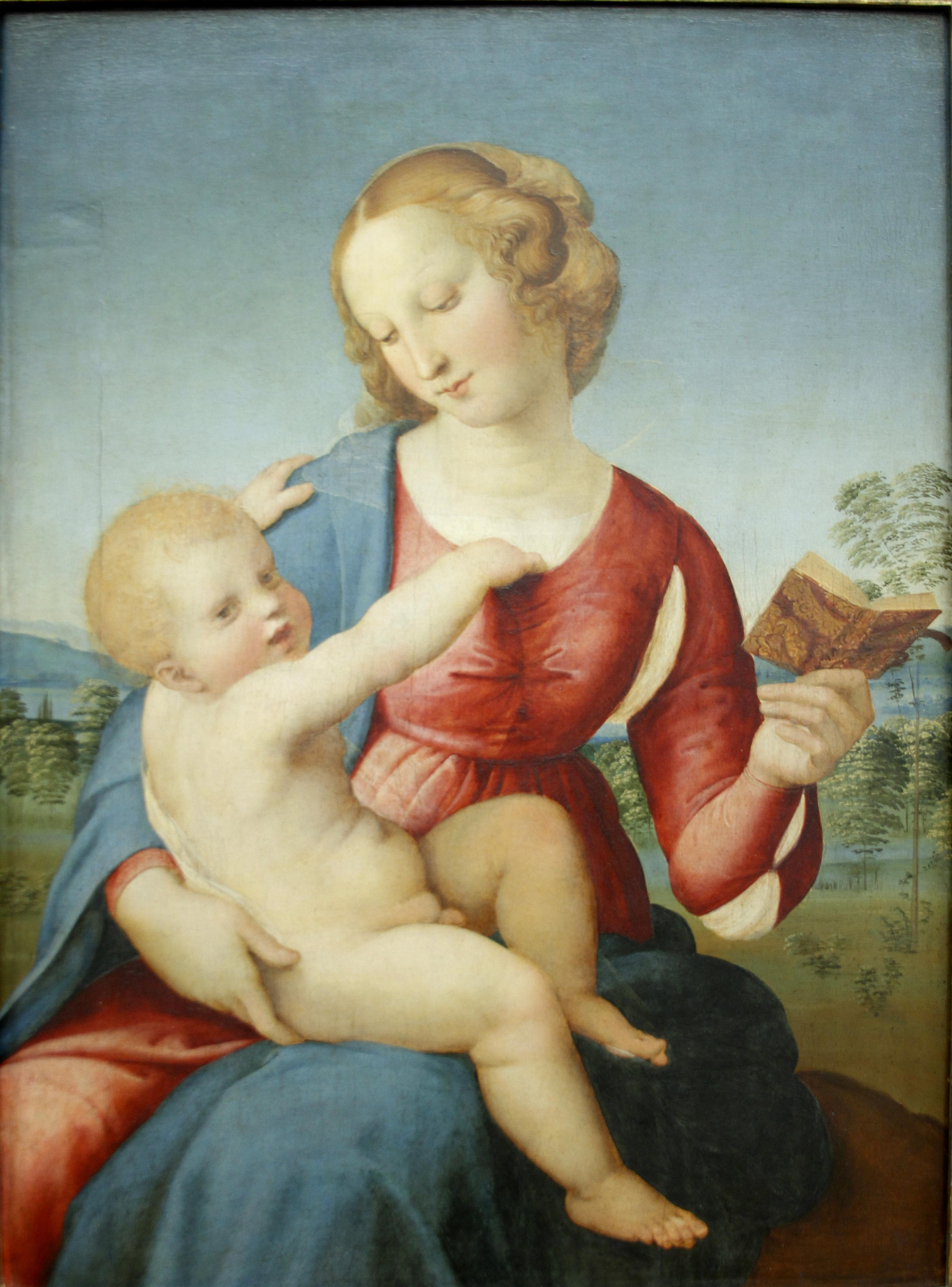 Gemäldegalerie - Berlin - Germany